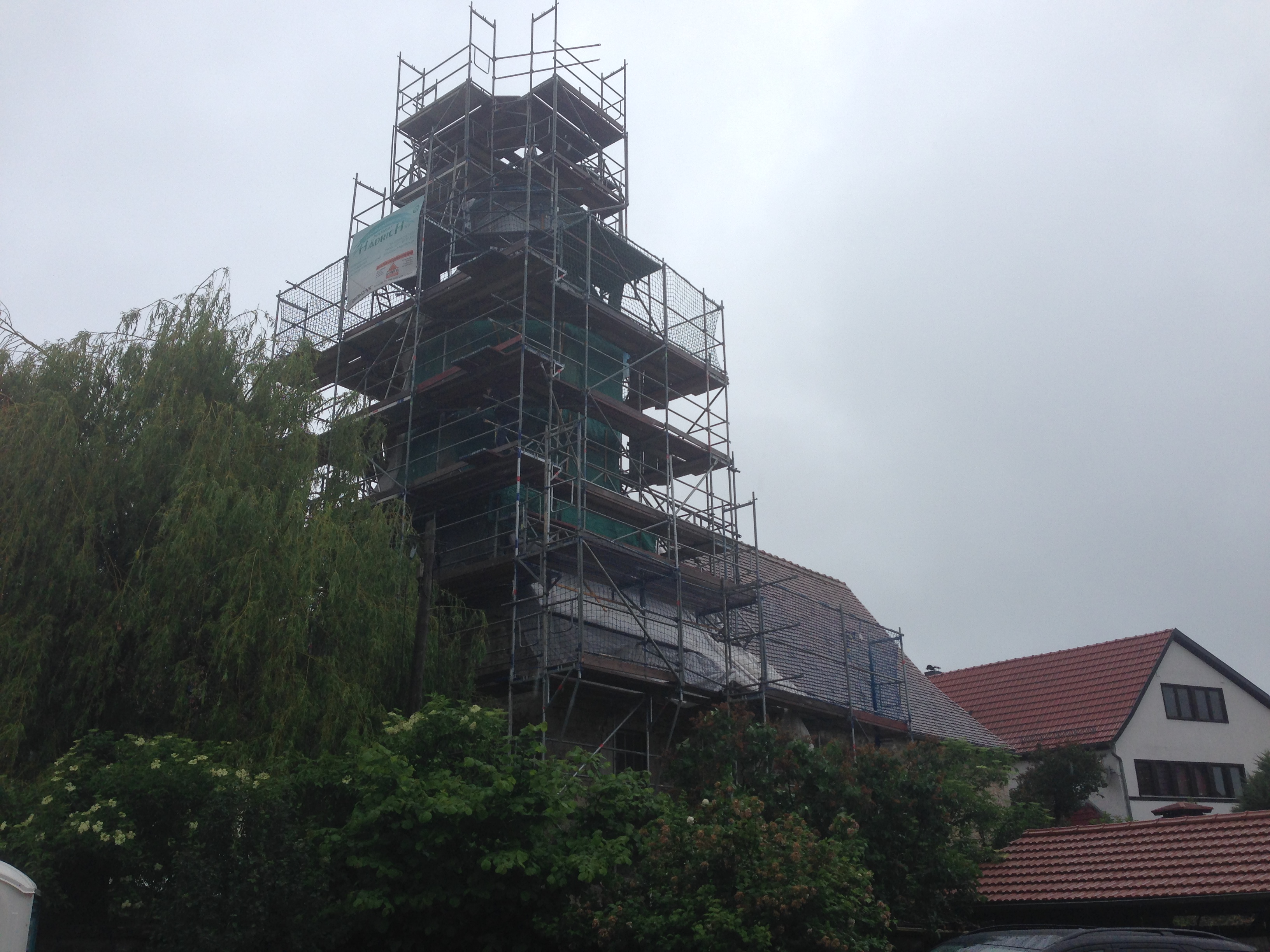 Einrüstung für Arbeiten zum Rückbau und Neuaufbau des Kirchenturmes